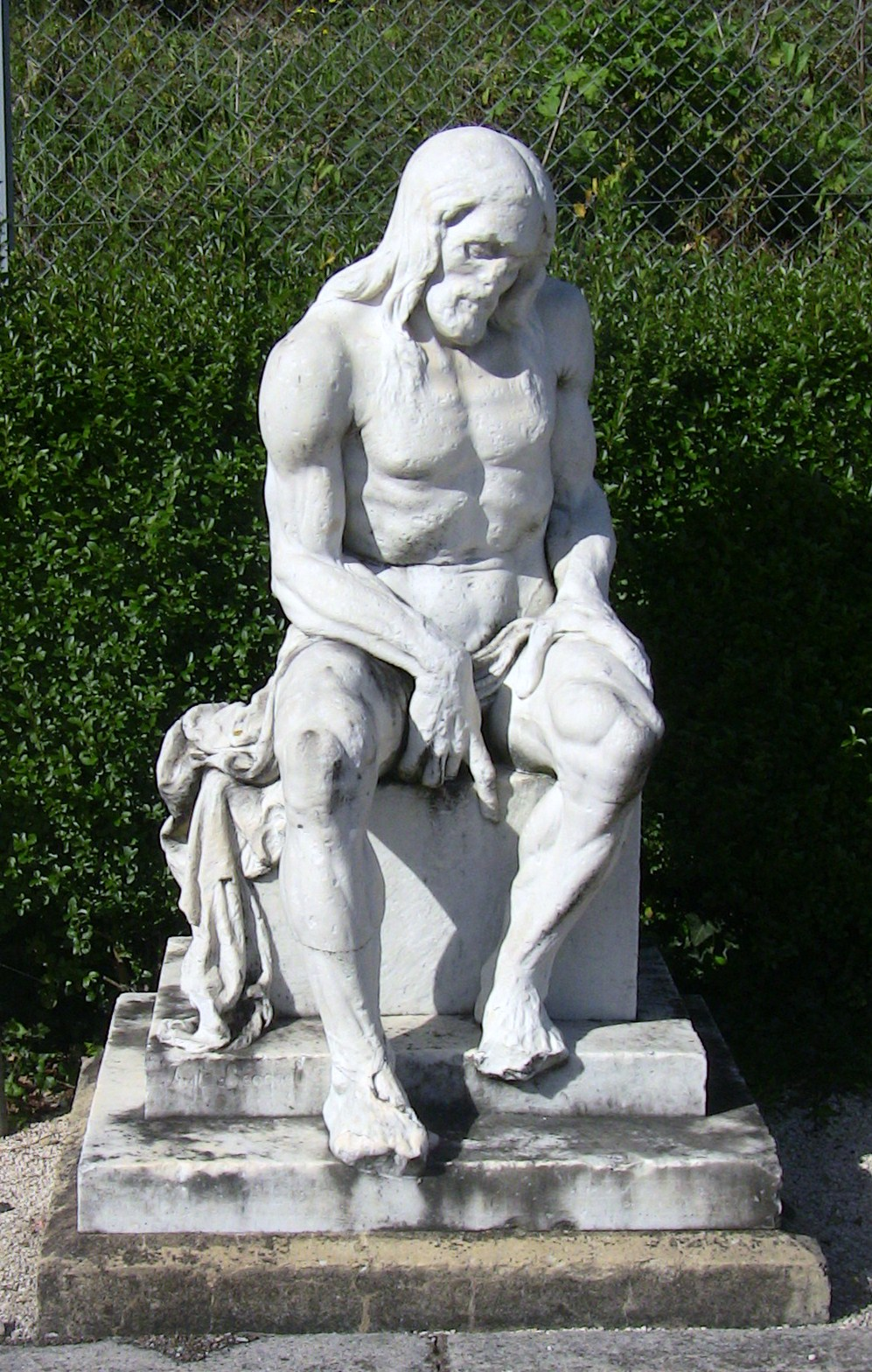 Just Becquet (1829-1907), statue d'homme assis, cimetière de Saint-Ferjeux de Besançon (Doubs, France).